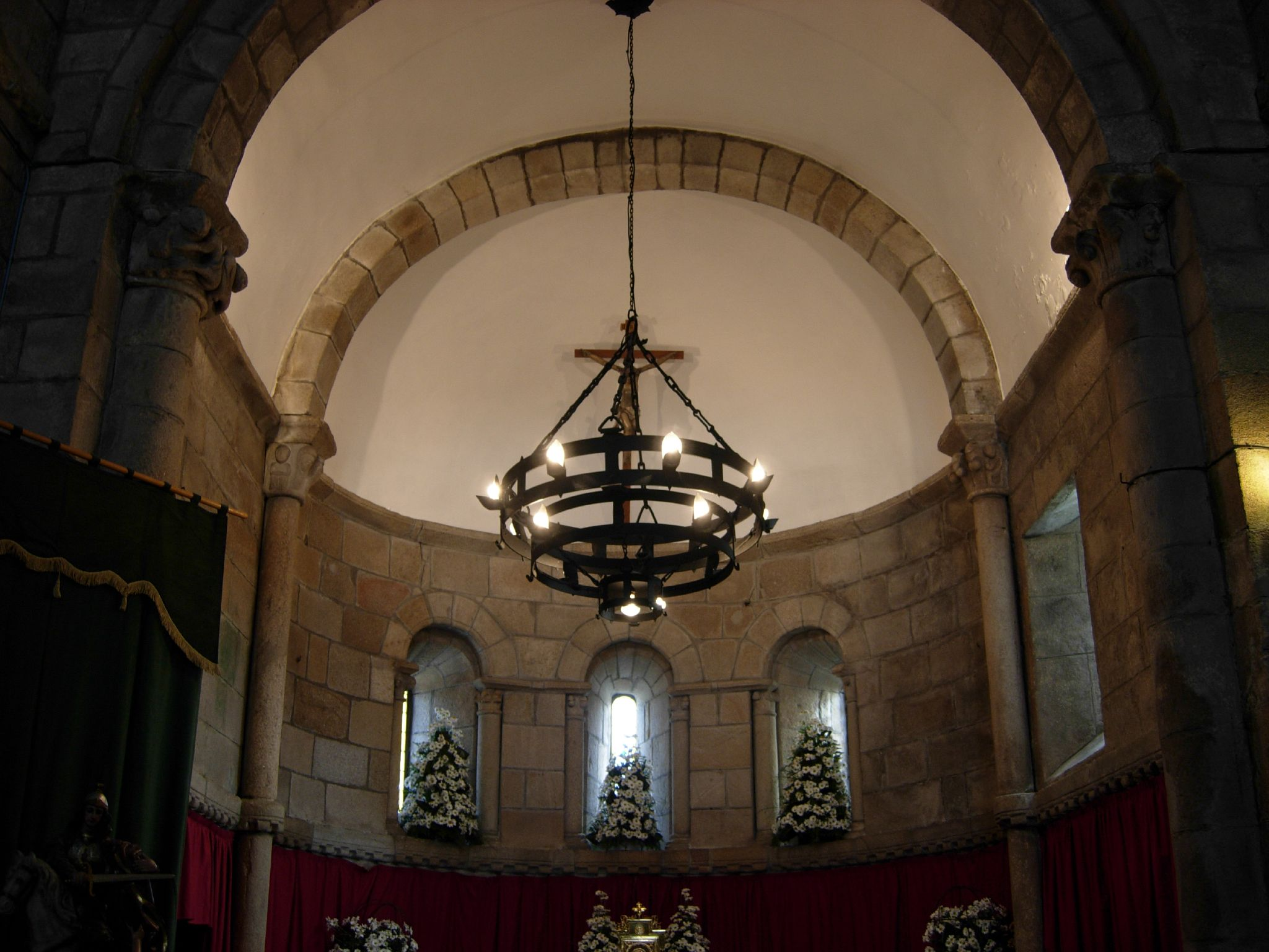 Capela maior da Igrexa de San Martiño de Sobrán - Vilagarcía de Arousa - Pontevedra